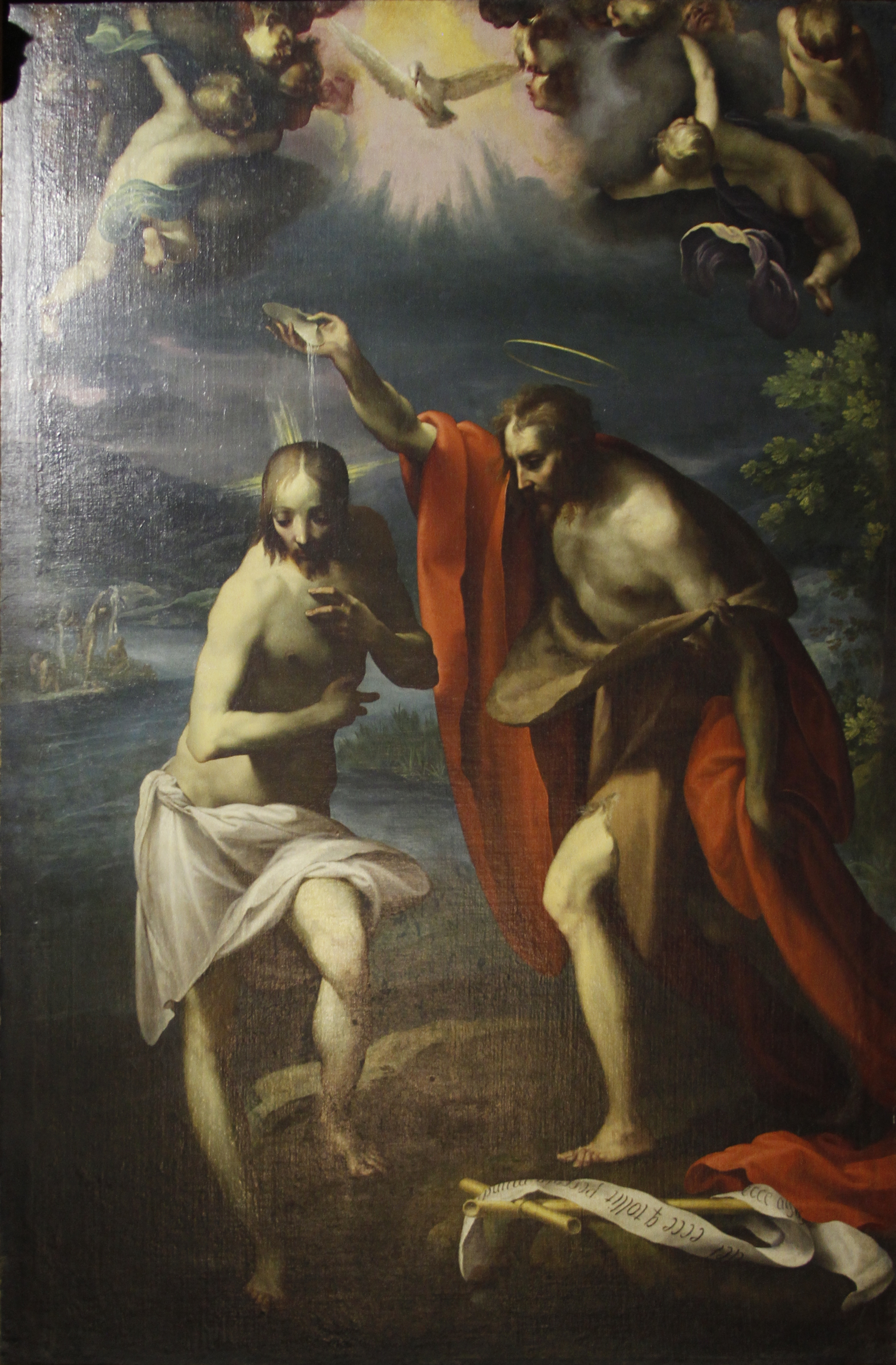 Catedral de Nápoles